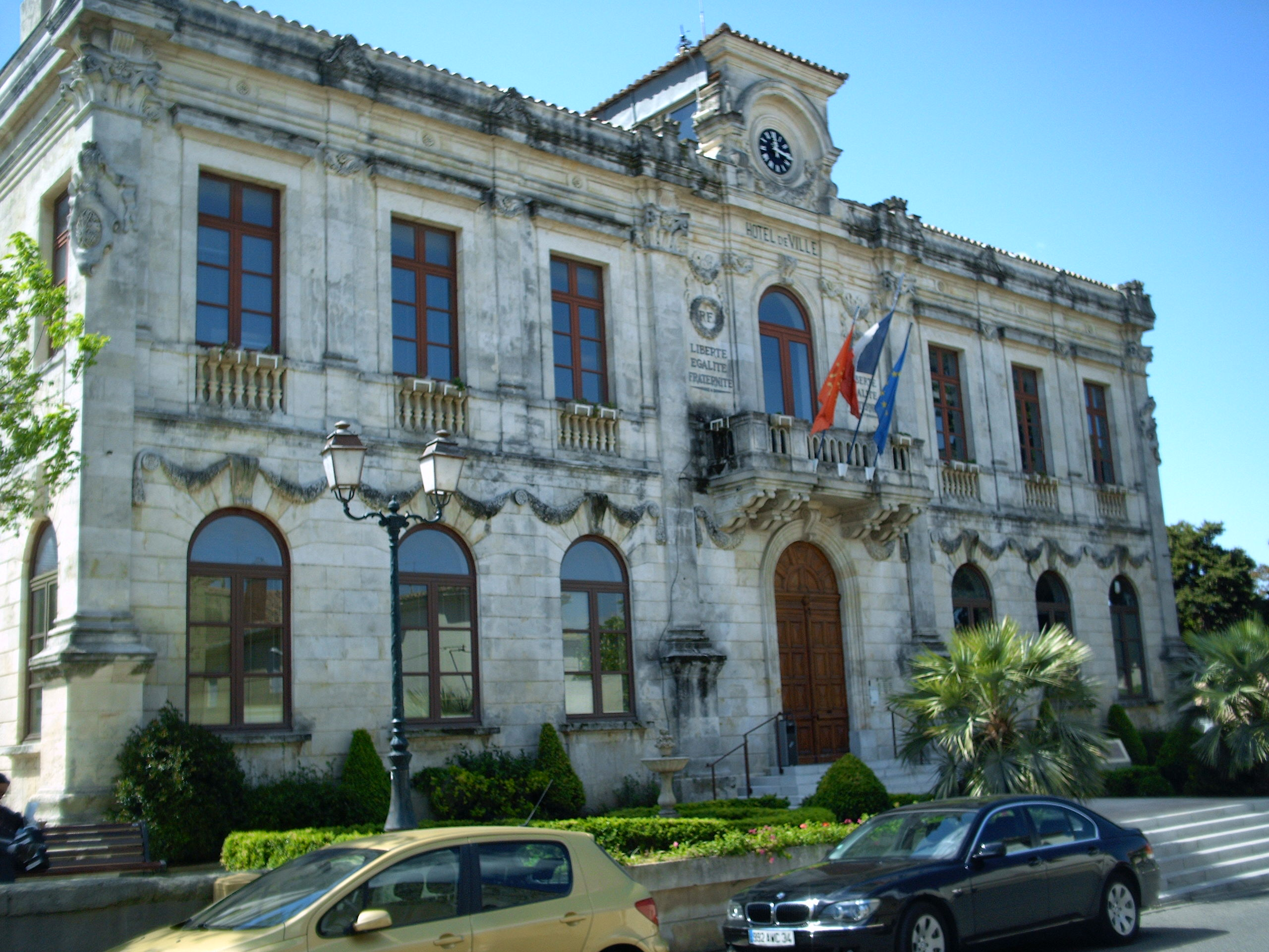 La mairie de Vauvert (Gard)